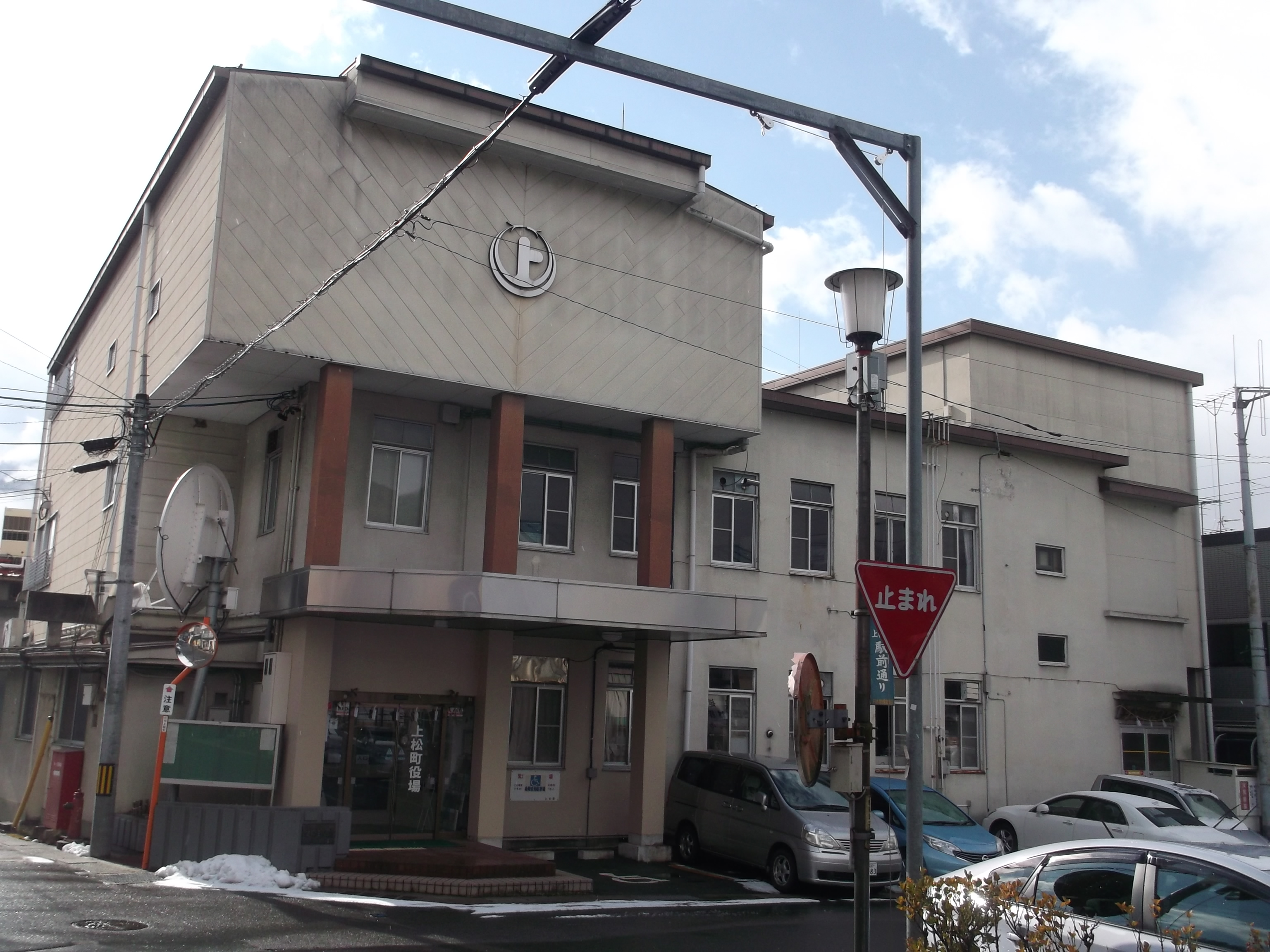 長野県木曽郡上松町役場